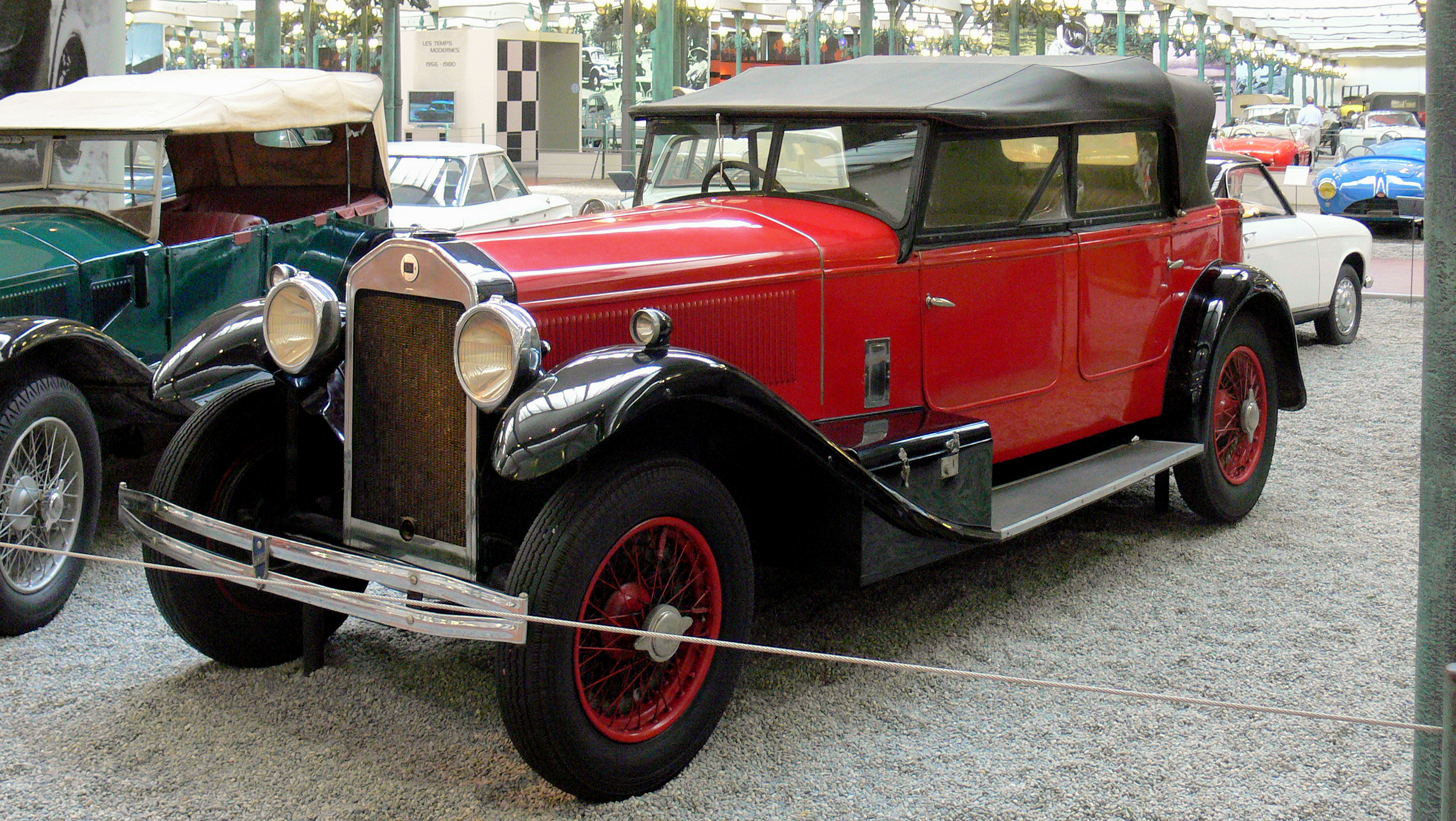 Lancia Dilambda (1929) im Musée National de l'Automobile (Muhlhouse)